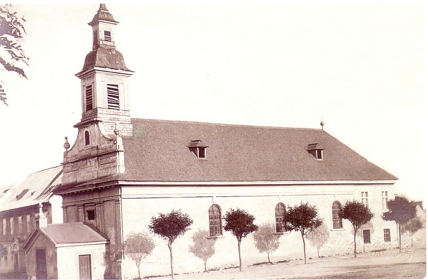 Das Gebäude wurde zum Pfarrhaus umgebaut.